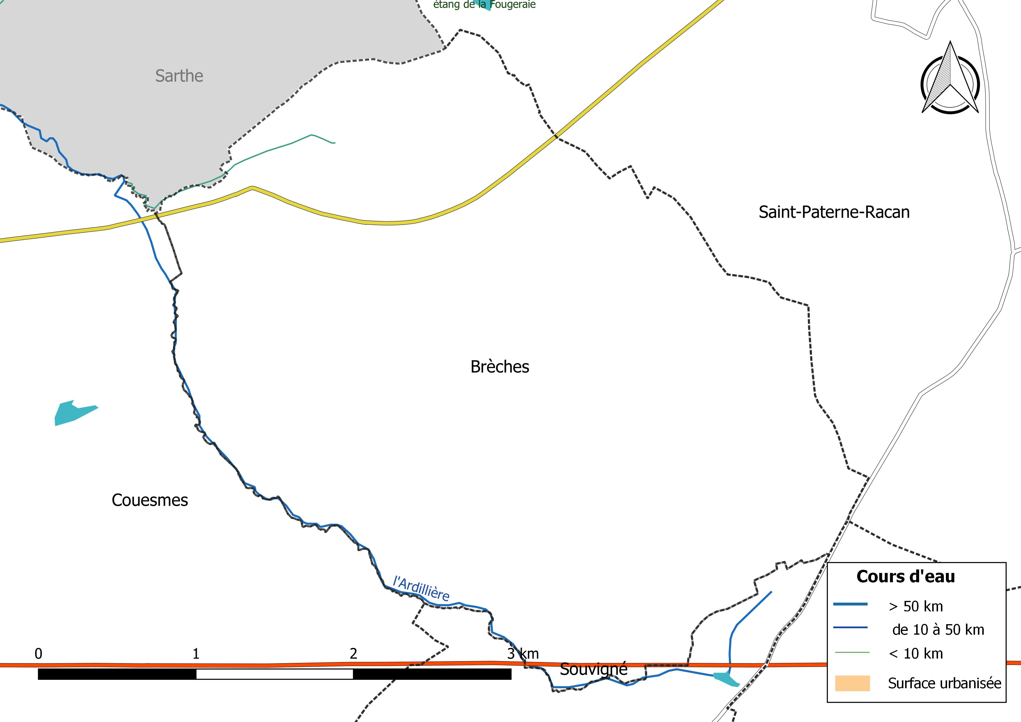 Carte du réseau hydrographique de la commune de Brèches (France).